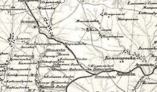 Дореволюційна карта П’ятихатського району: Скан зі старої карти П’ятихатського району